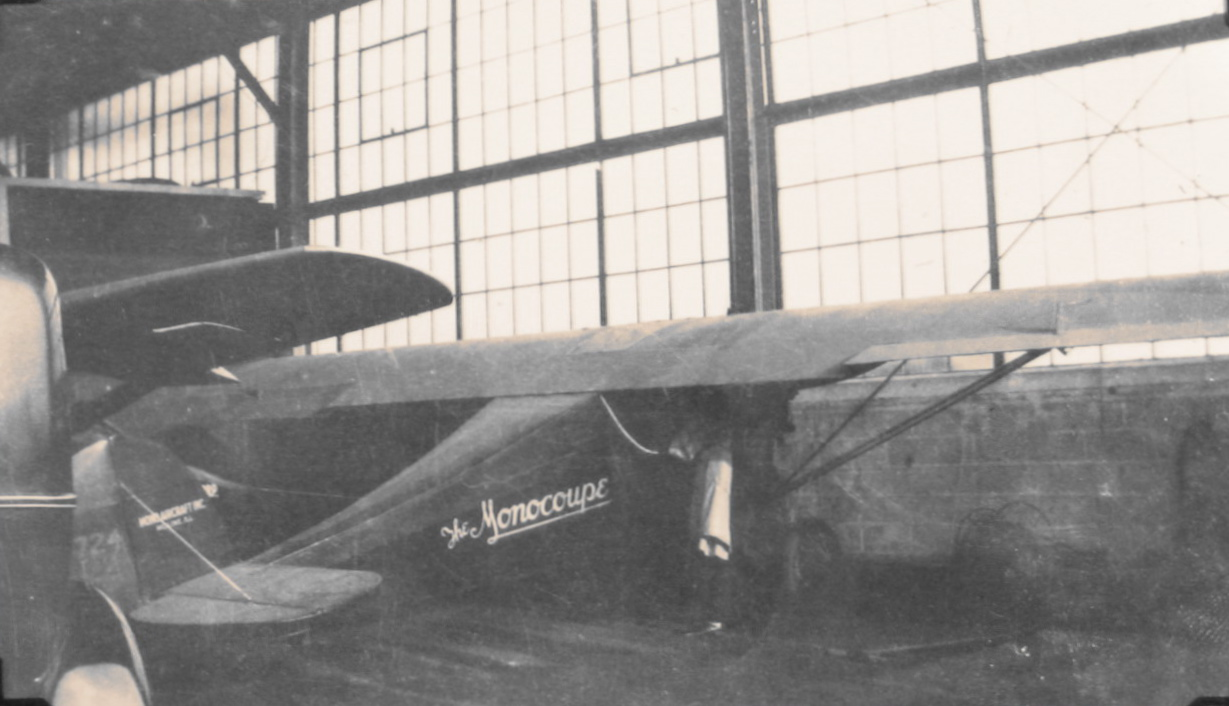 Velie Monocoupe 90 in hanger, 1930s.